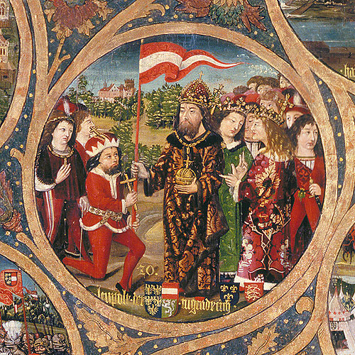 Herzog Leopold V. (der Tugendhafte), links knieend, erhält sein neues rot-weiß-rotes Banner von Kaiser Heinrich VI. nach der Schlacht von Akkon. Ausschnitt aus dem Babenberger Stammbaum, Stift Klosterneuburg.